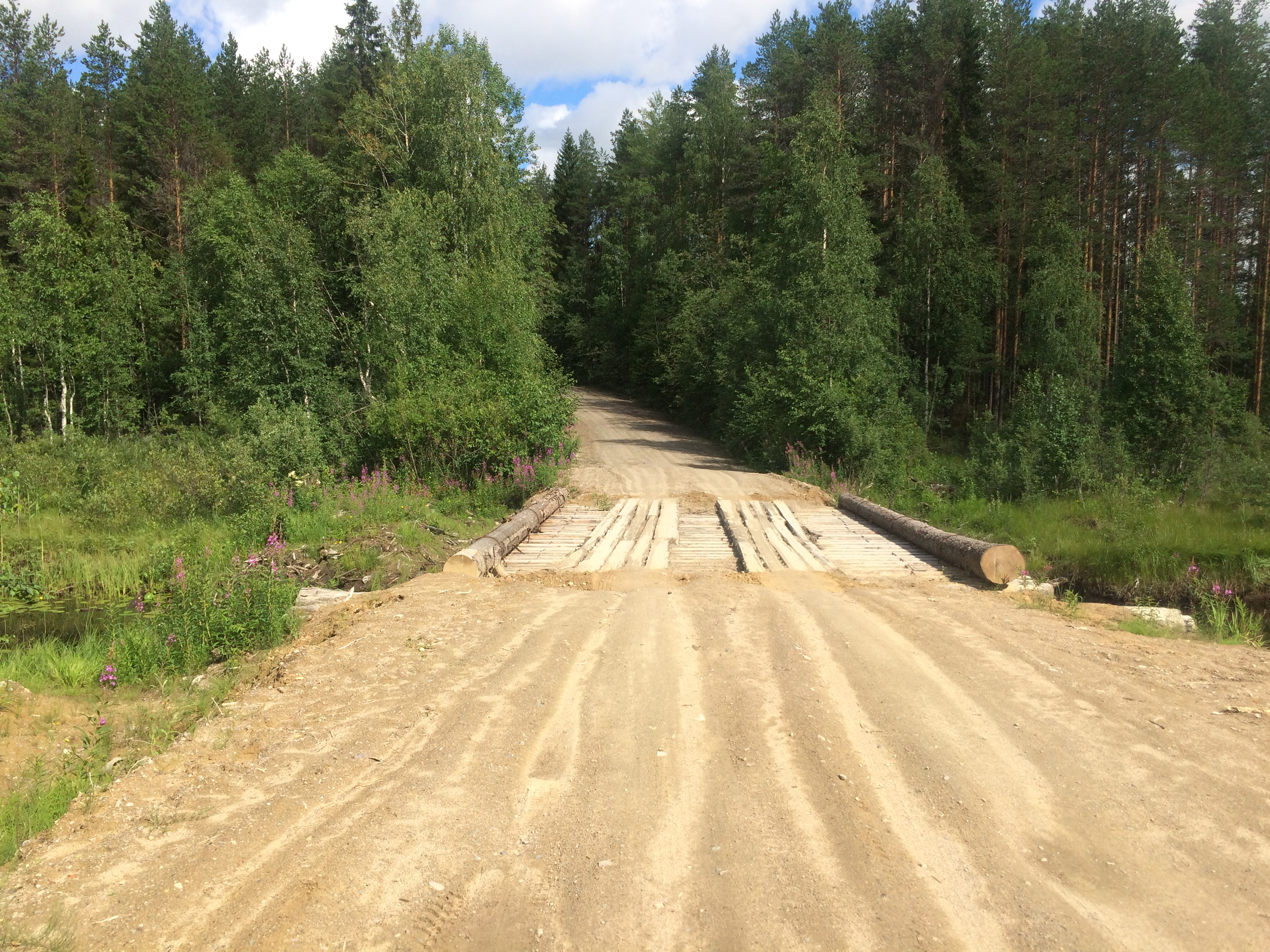 Няльма